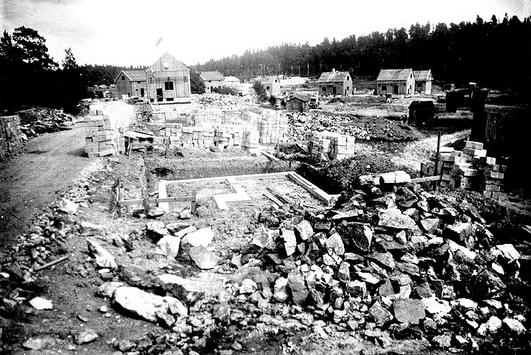 Åkeshovs småstugeområde under uppbyggnad, Bromma, Stockholm.